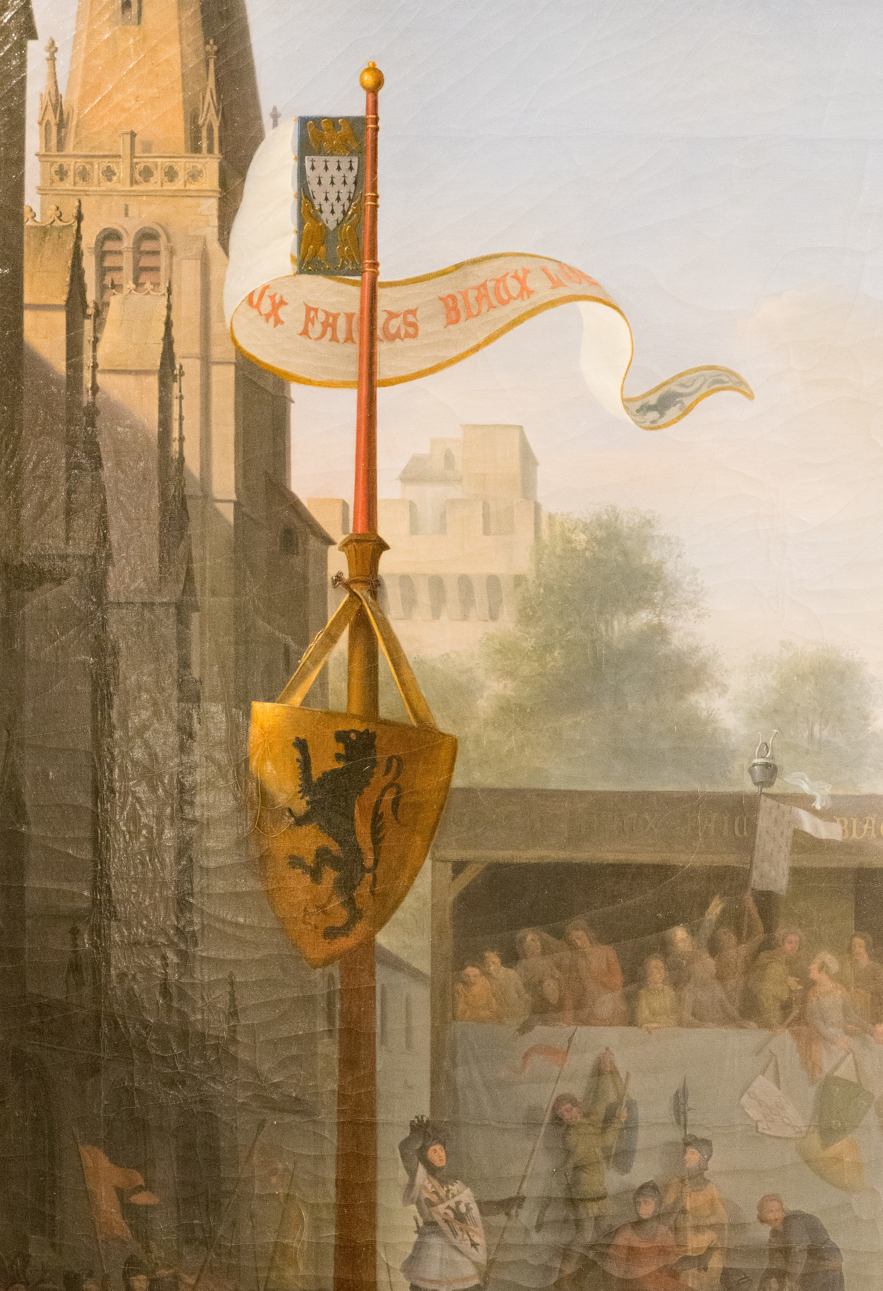 detail